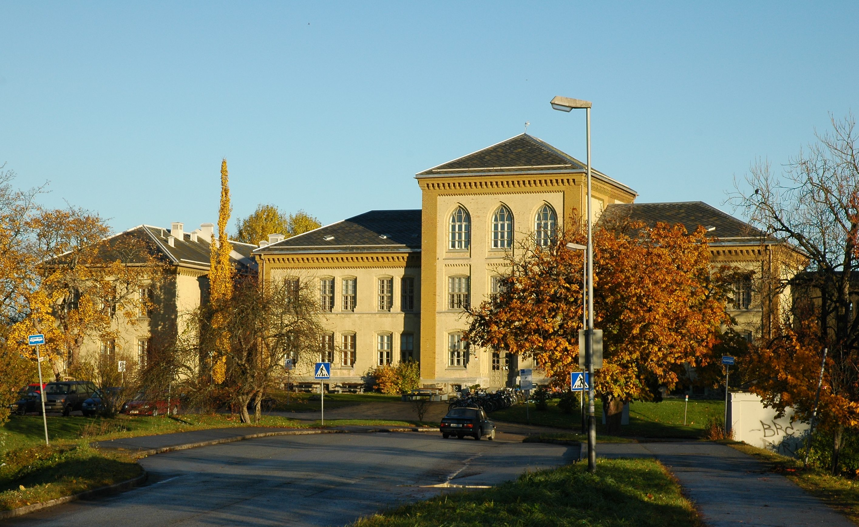 Høgskolen i Sør-Trøndelag på Rotvoll. Rotvoll Asyl, nå Høgskolen i Sør-Trøndelag. Rotvoll (statsasyl), Trondheim (1872).